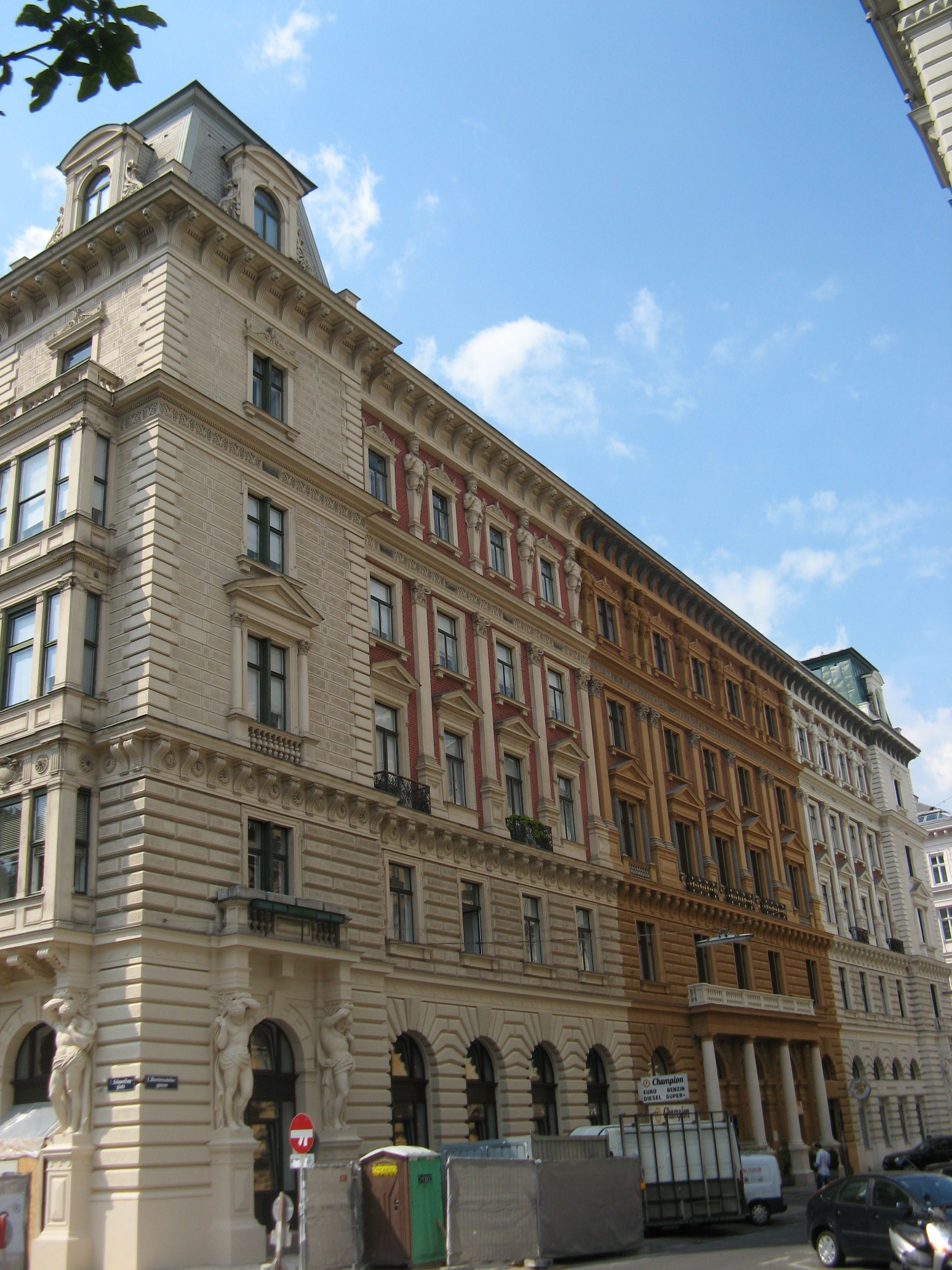 Bartensteingasse 1-5 (1873-1874) von Josef Hudetz und Moritz Hinträger, Wien-Innere Stadt